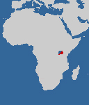 Fischer's Lovebird distribution